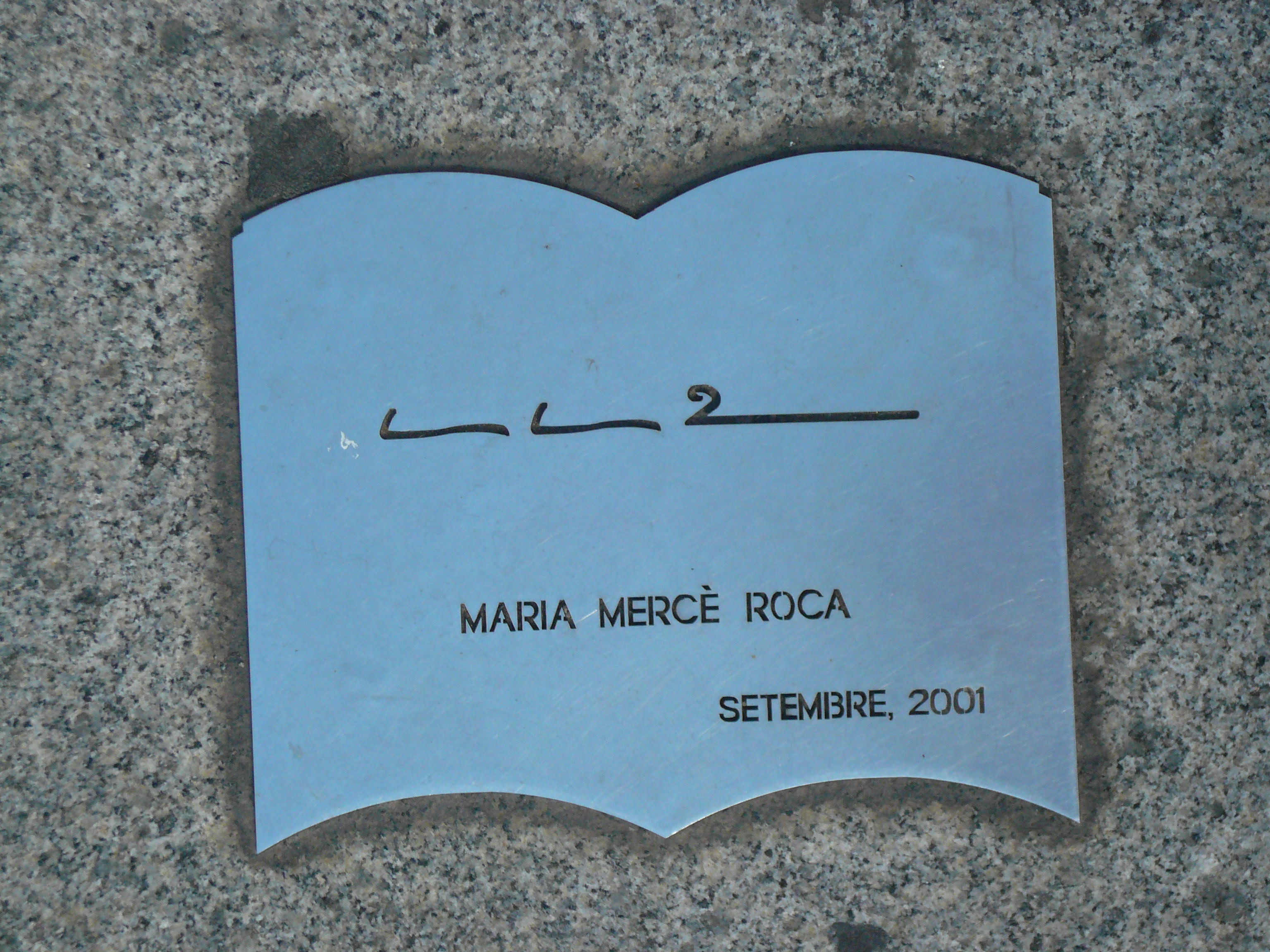 Monument al Llibre, Saltamartí. Gran Via de les Corts Catalanes amb pg. de Gràcia (Barcelona). Escultor: Joan Brossa, signada, amb la col·laboració de Josep Pla-Narbona. Material: planxa pintada d'acer inoxidable -originalment d'acer- sobre base d'acer inoxidable i de granit gris. 1994. 34″ N, 2° 10′ 05.05″ E